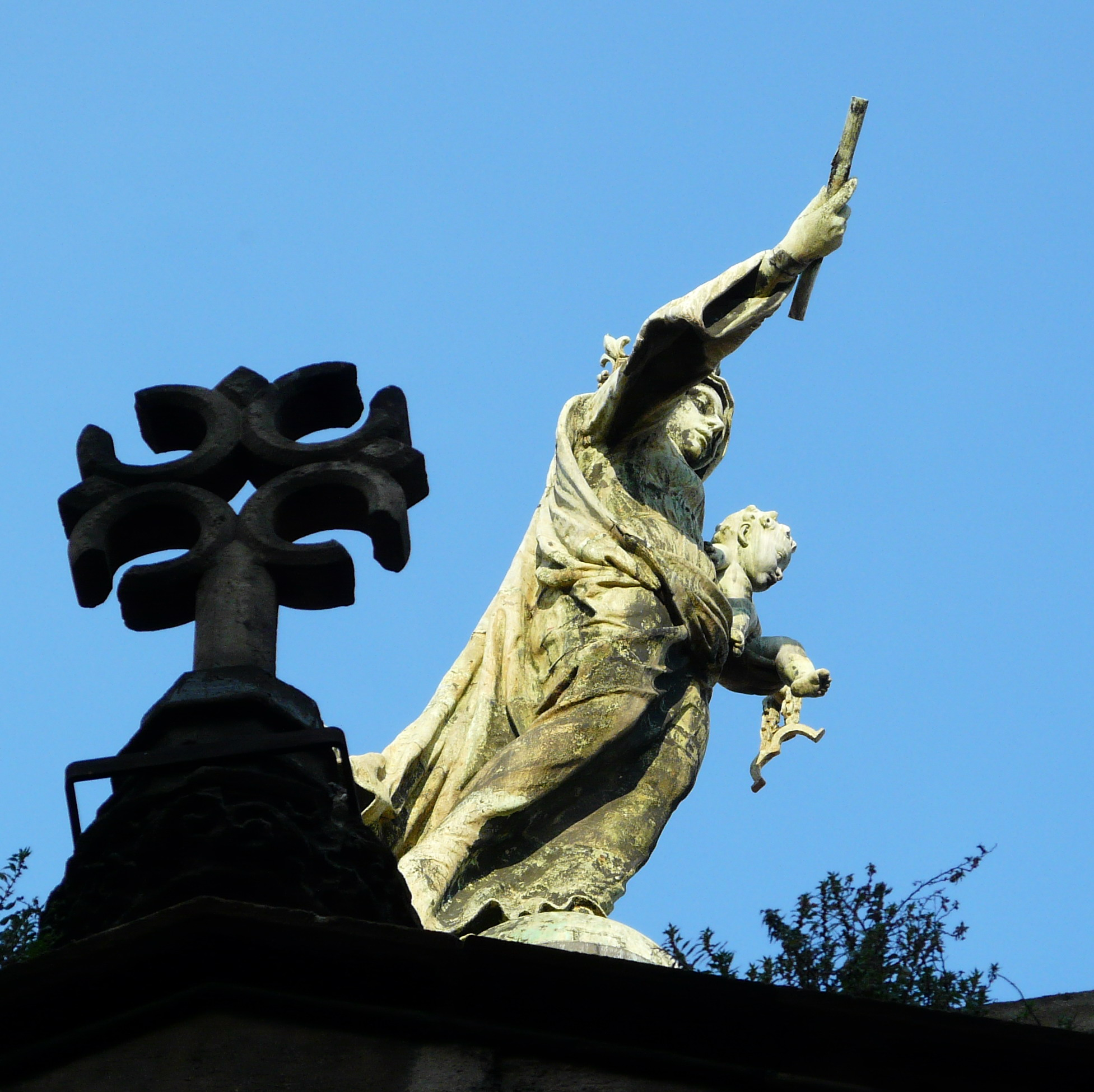 Basílica de la Mercè (Barcelona). Creu de la façana gòtica (originalment de l'església de Sant Miquel) i imatge de la Mare de Déu de la Mercè de la cúpula de la basílica.